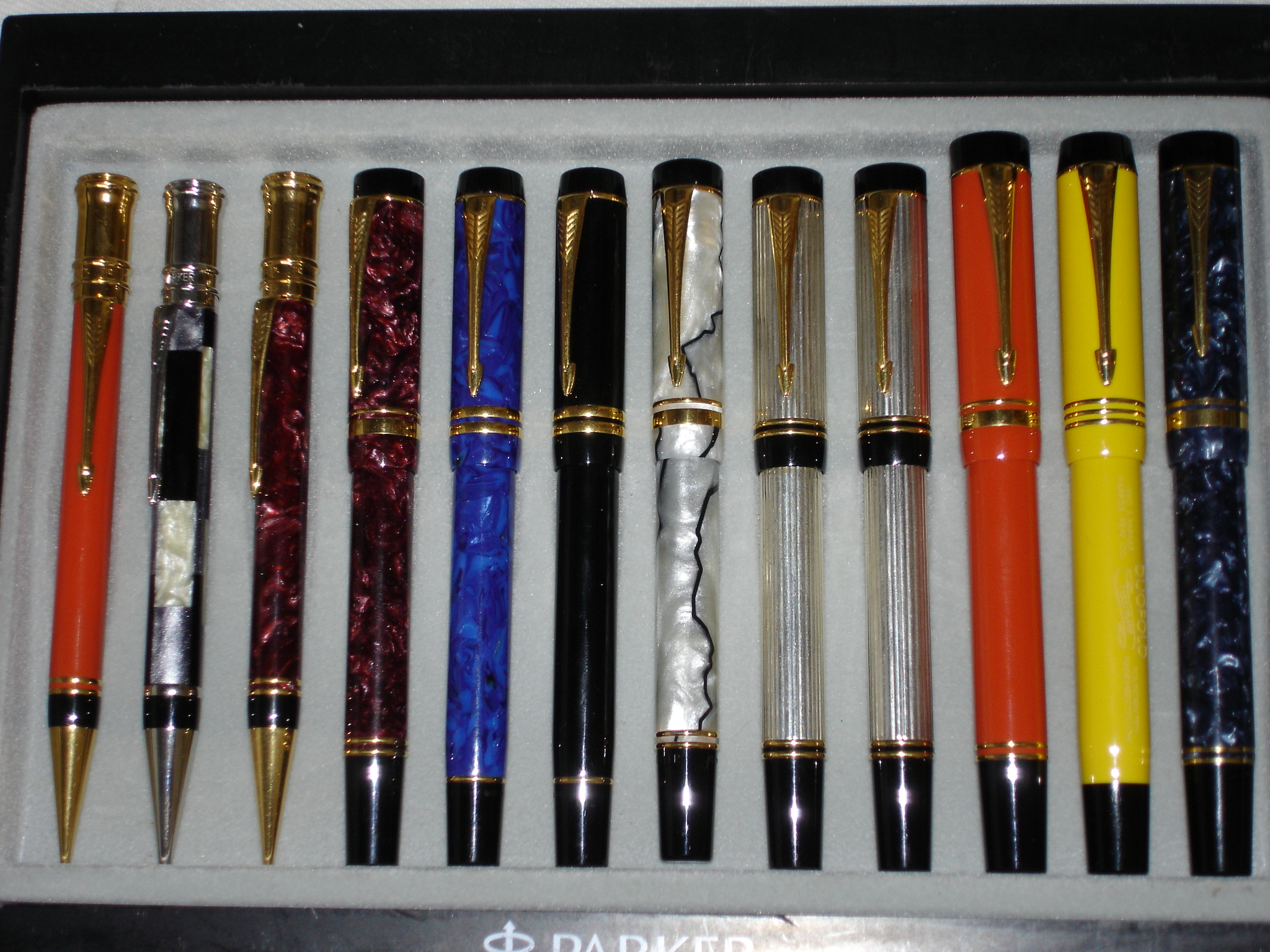 Parker tray (duofold).